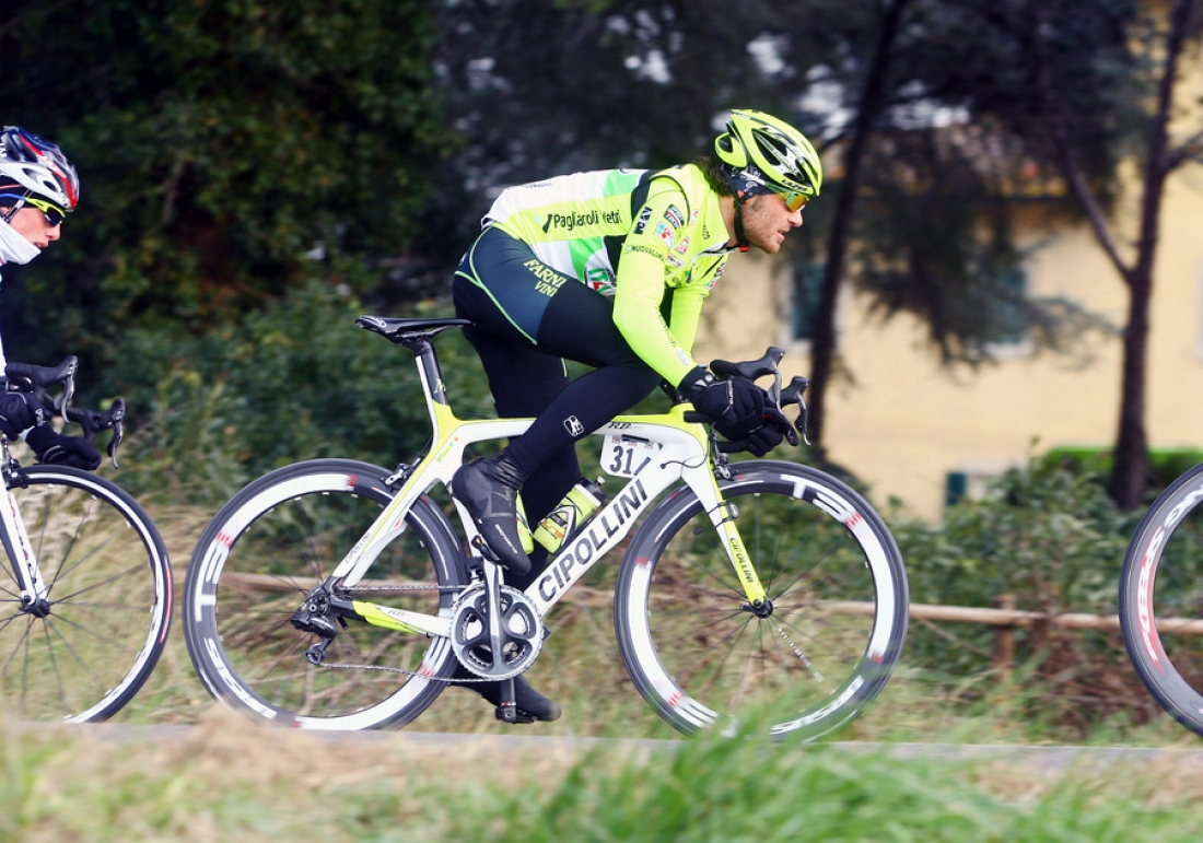 Davide Ricci-Bitti del Team Farnese Vini su una MCipollini RB 1000